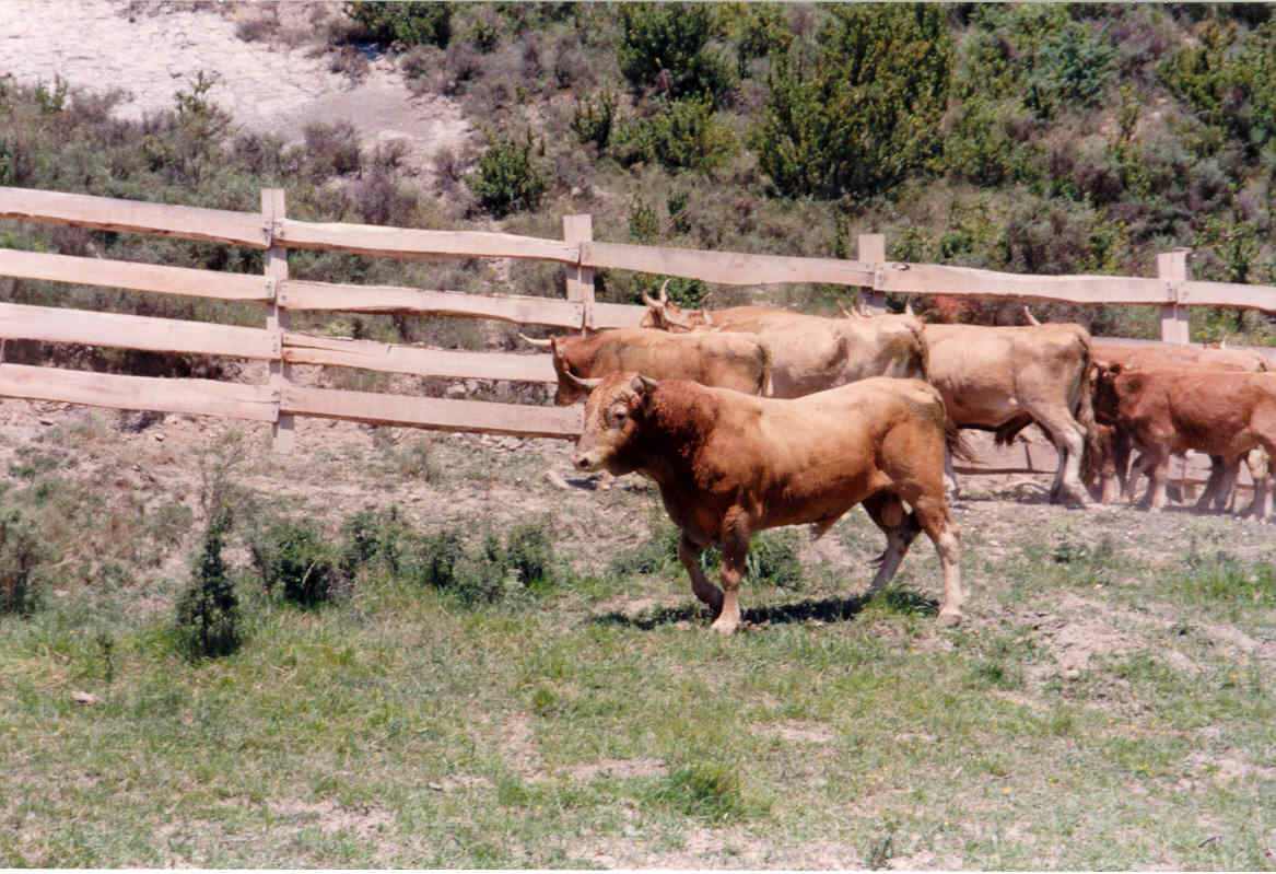 Betizu zezena Zariketan